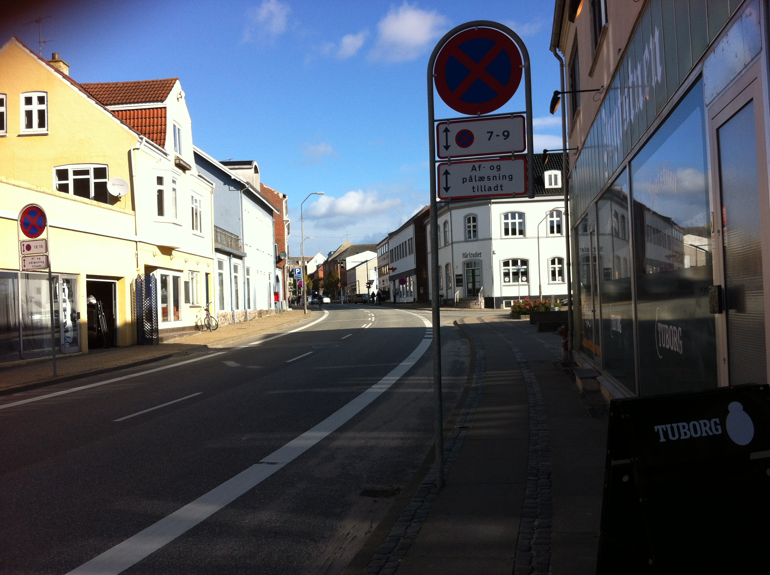 Udsigt over Storegade. Set mod lyskrydset.